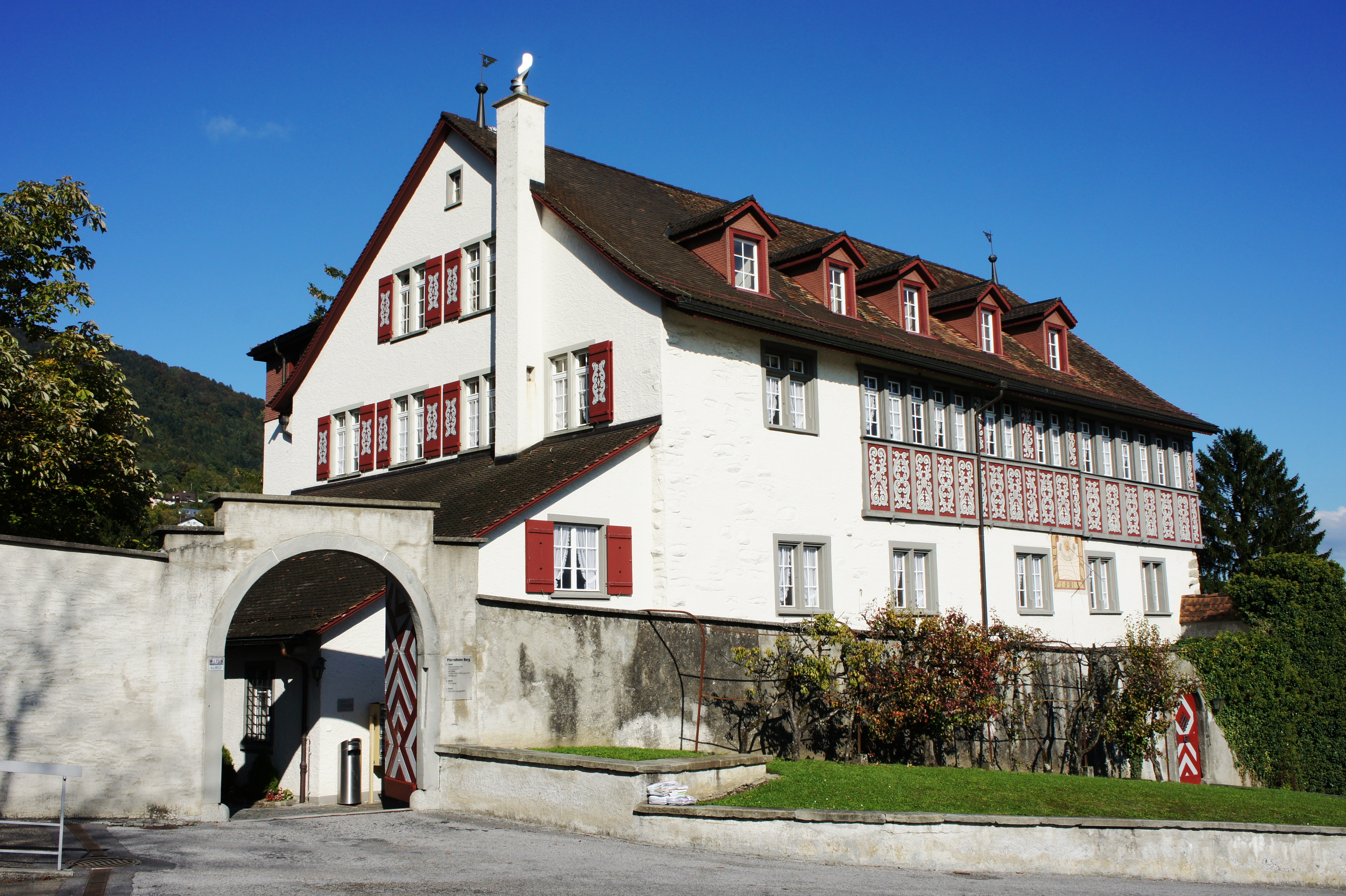 Die Burg steht nordöstlich der kath. Kirche in Rebstein. Blick aus südwestlicher Richtung auf den gemauerten Torbogen, der zum Innenhof führt. Der Hauptteil des Gebäudes ist gemauert. Der südöstliche Teil des 3. Stockwerkes besteht aus einem mit Malereien verziertem Fachwerk.